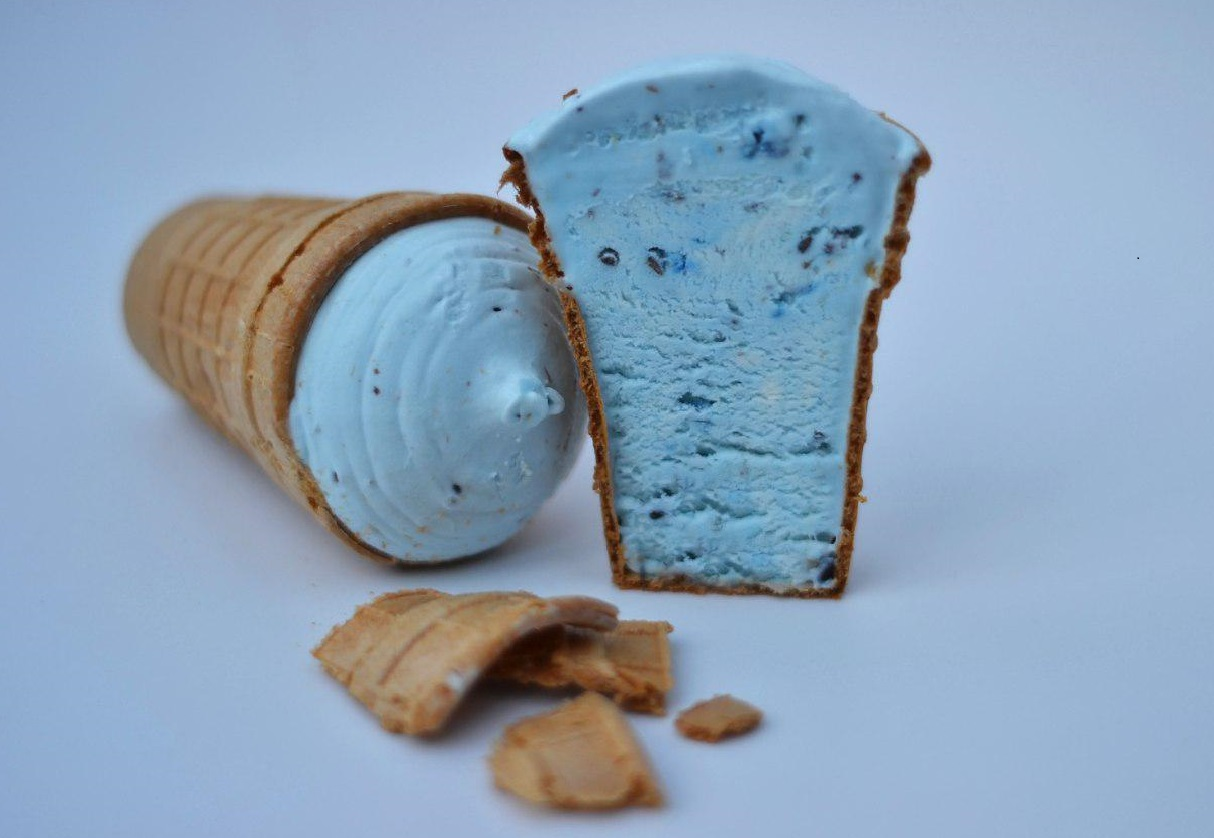 Валошкавае марозіва (валошкавы пламбір) – марозіва з дадаваннем кветак валошак. Першае валошкавае марозіва вырабіў беларускі брэнд “Белы полюс”. На ўпакоўцы размешчаны англа-беларускі размоўнік з фразай "Жыве Беларусь!"